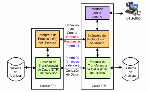 Diagrama del modelo FTP de transferencia ese colgado de archivos.